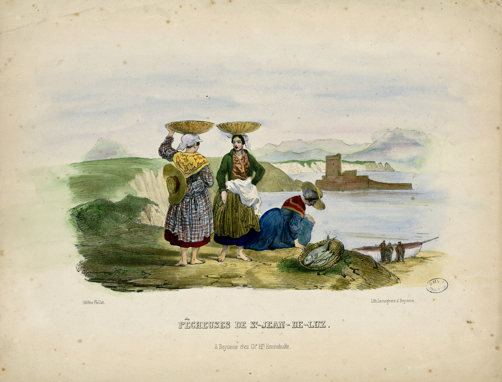 Fait partie d'un recueil de lithographies : pl. 1, 2, 6 et 7 imprimées chez Lemercier à Paris ; les pl. 6 et 7 sont extraites de Album des deux Frontières. La pl. 1 n'est pas la même que la pl. 12 de l'Album : au premier plan le pont est en bois et non en pierre. Pl. 3, 4, 5 et 9 lithographiées chez Lamaignère à Bayonne. La pl. 9, en coul., est d'Hélène Feillet. Pl. 8 et 10 lith. chez Bernain. La pl. 8, en coul., est d'Hélène Feillet. Ancely, René (1876 - 1966). Possesseur